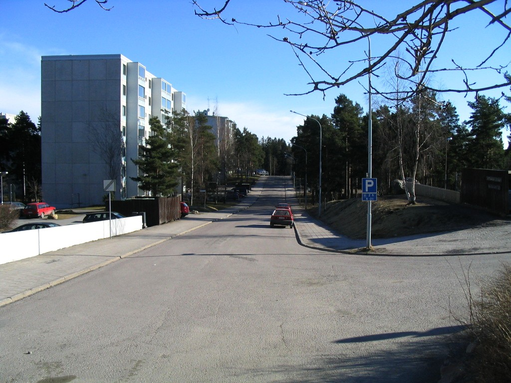 Jalustinkatu Turun Uittamolla.